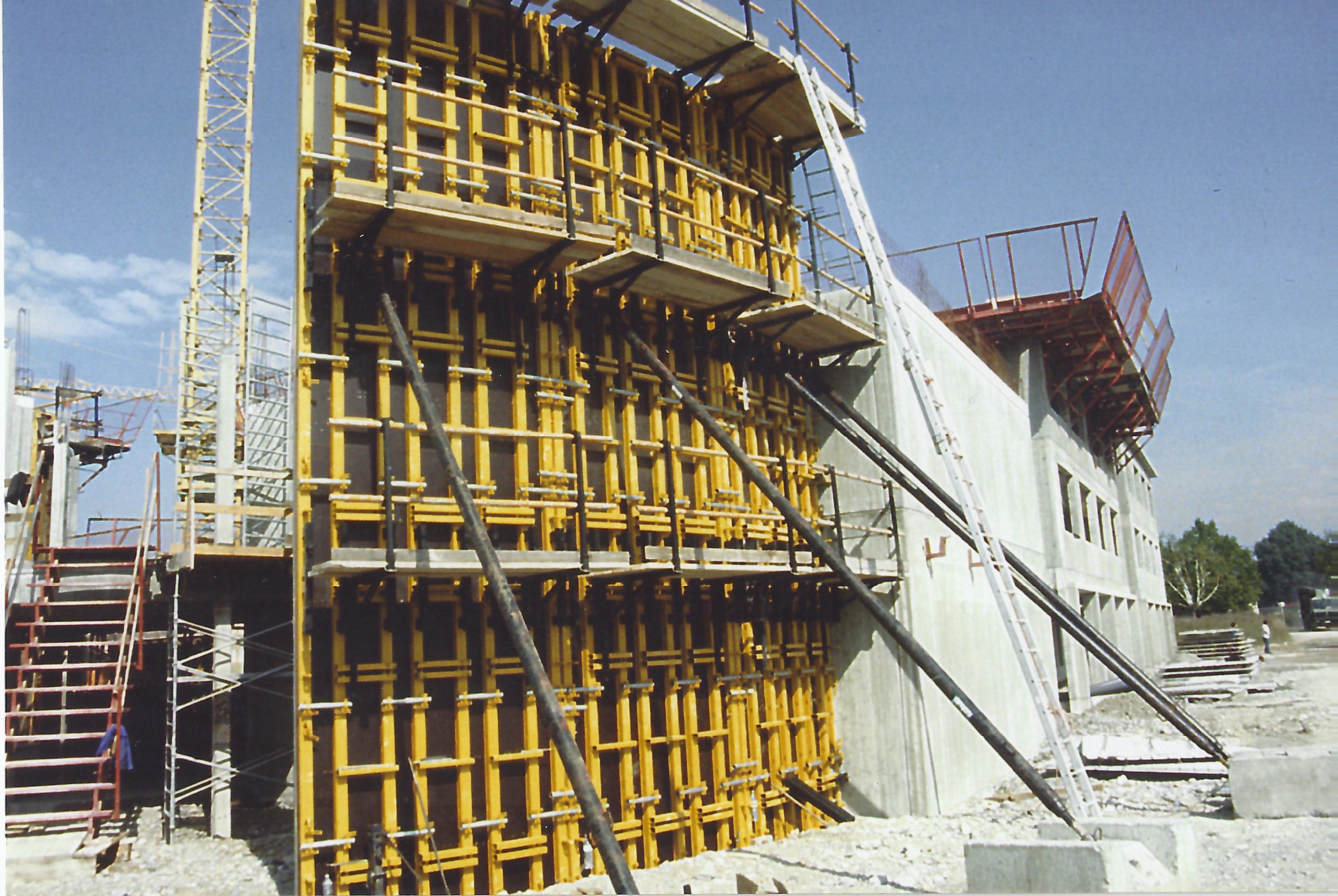 Coffrage de fabrication helvétique résistance à 100kN pour un béton de type 4.1